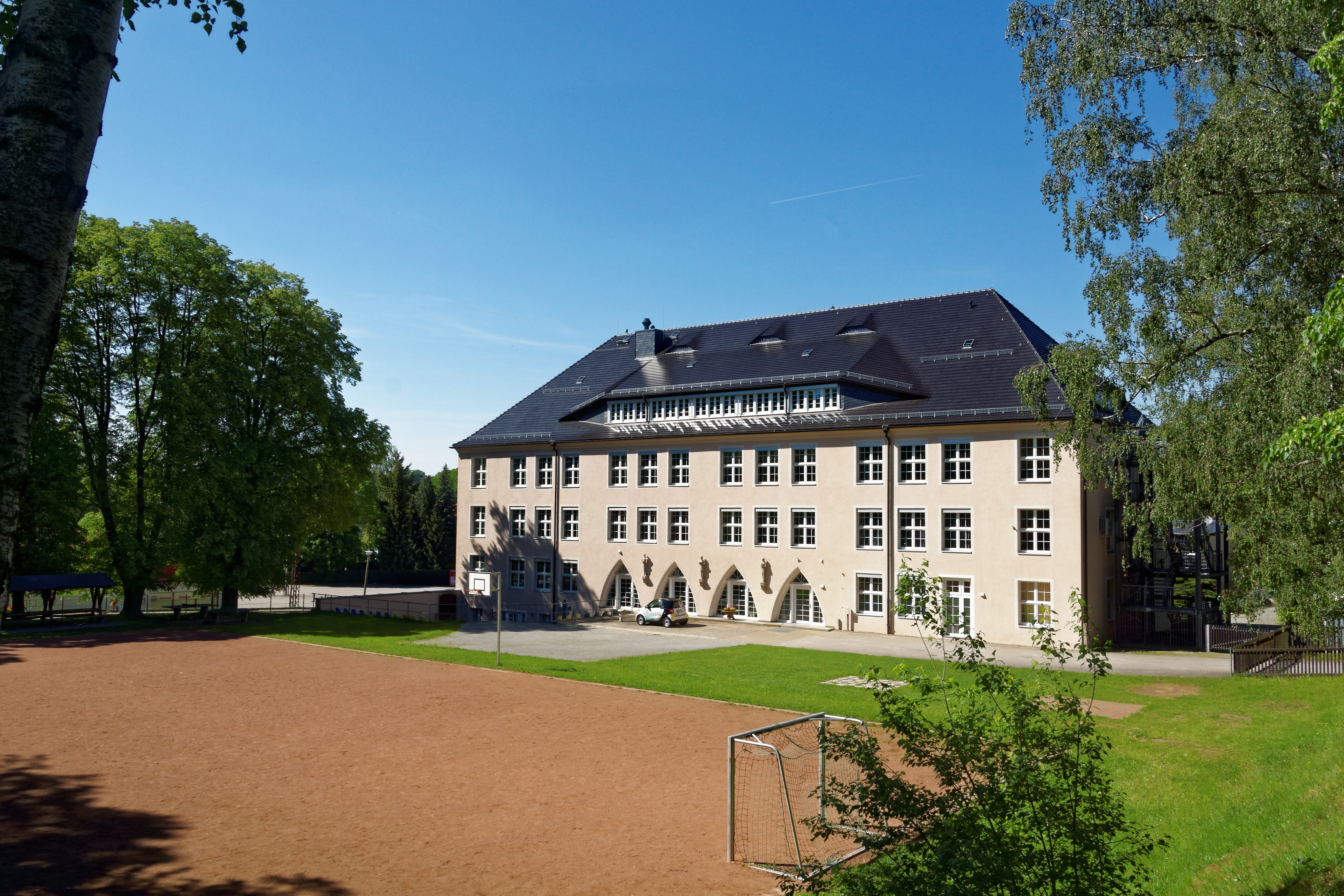 Pestalozzi-Oberschule Südseite, Ansicht aus dem Jahr 2019